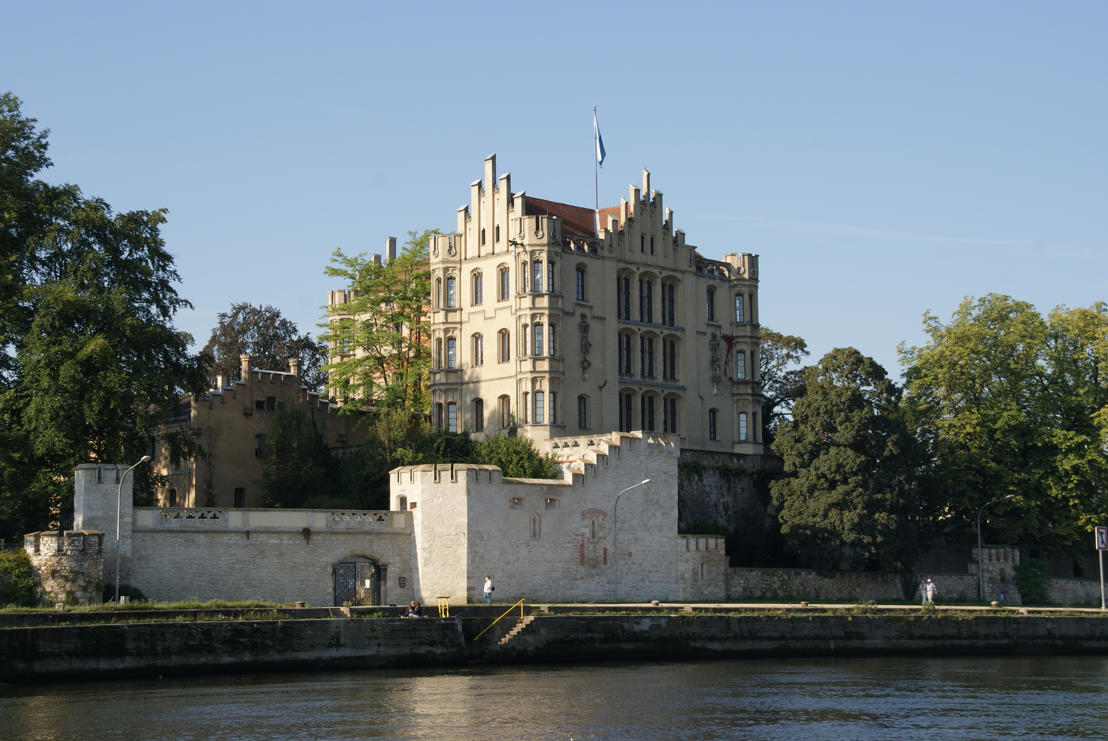 Königliche Villa in Regensburg, Adolf Schmetzer Straße 1, von König Maximilian II. 1854-56 erbaute Sommerresidenz